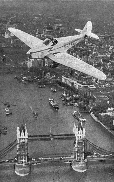 Tipsy B s motorem Walter Mikron nad Londýnem